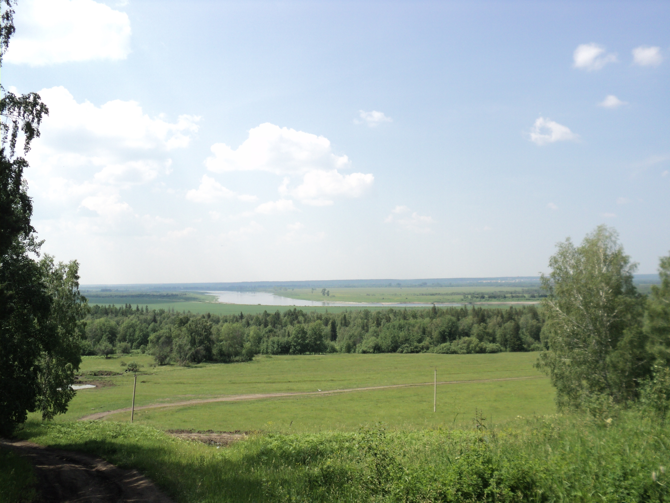 Томский район